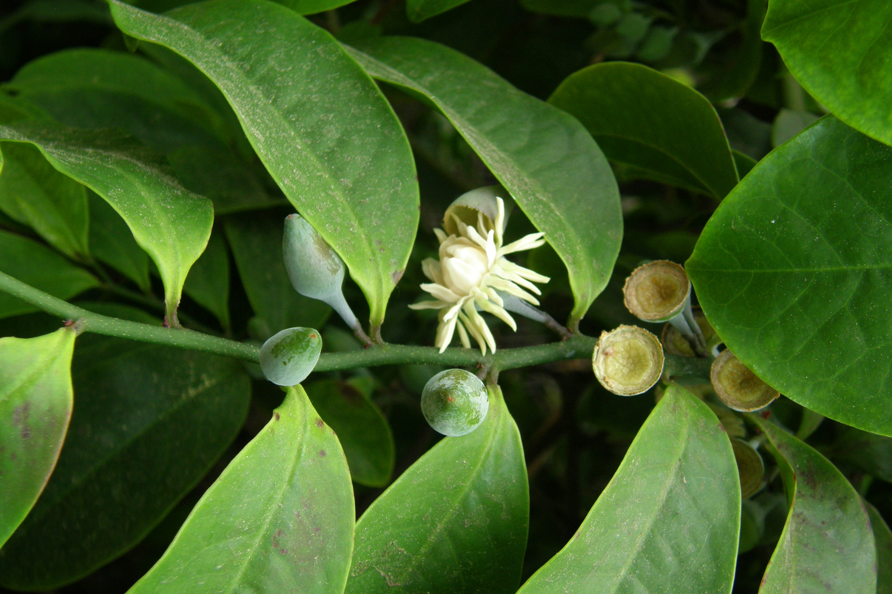 Fleurs d' Eupomatia Laurina R.Br dans la serre du Botanischer Garten de Berlin-Dahlem.